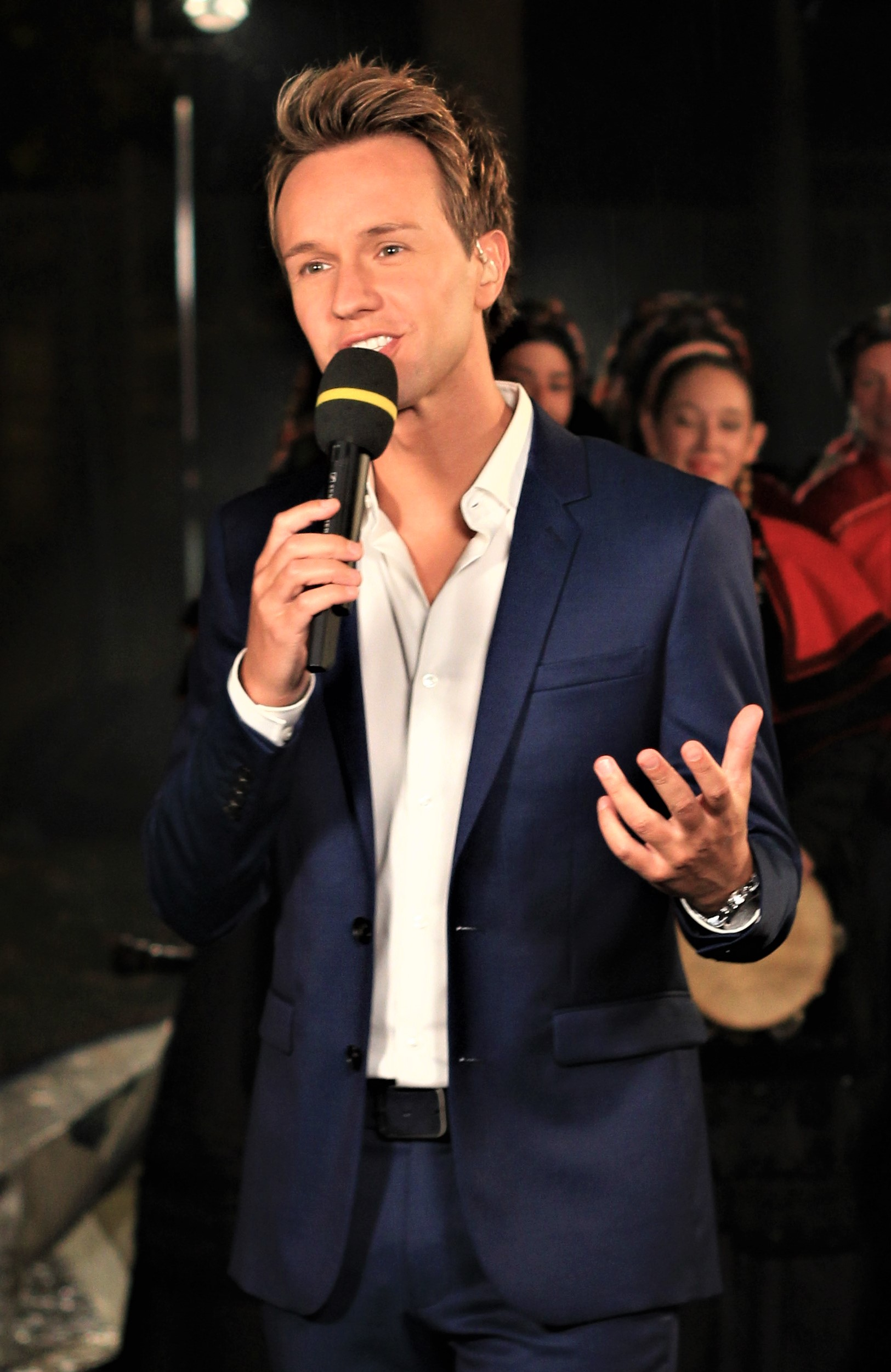 Cyril Féraud pendant le festival interceltique de Lorient 2018